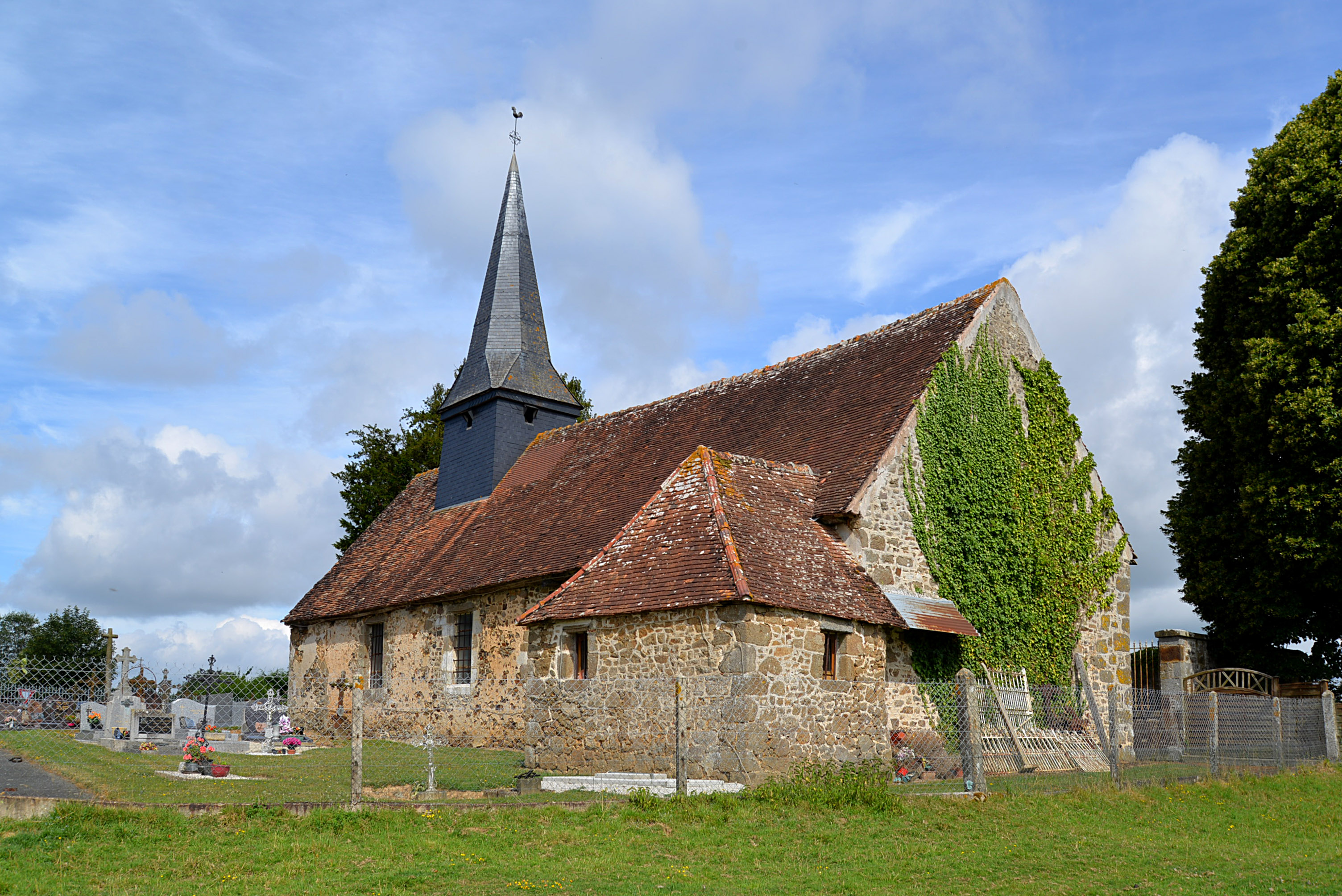 La Lande-de-Lougé (Orne)